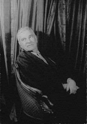 Malcolm Cowley, March 26, 1963